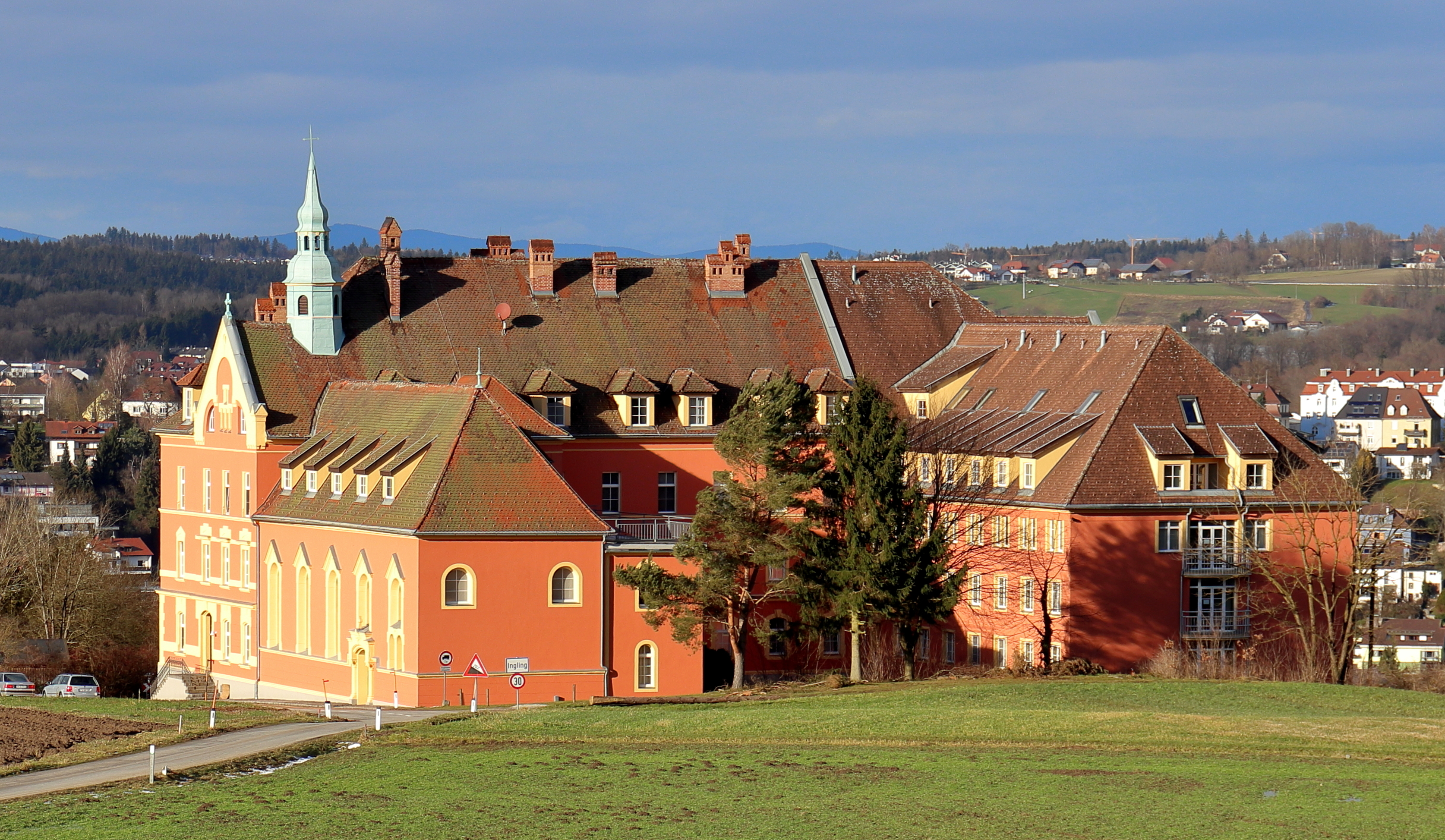 Südliche Ansicht des ehemaligen Salvatorklosters Hamberg